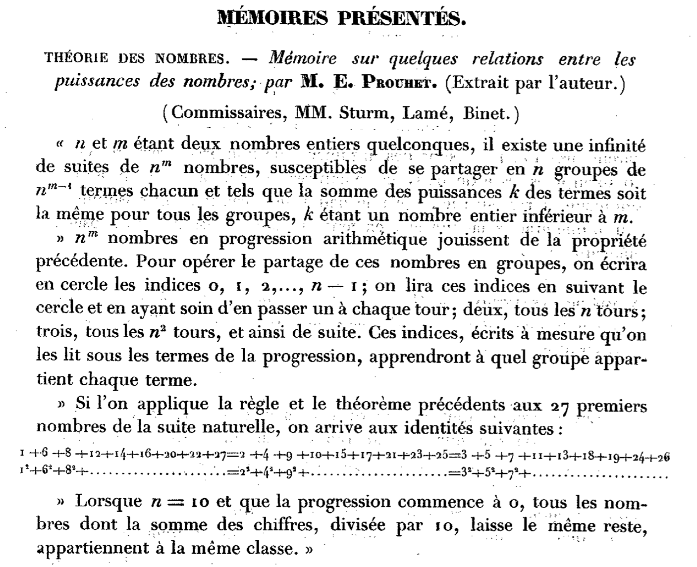 Note de Prouhet de 1851 définissant la suite de Prouhet-Thue-Morse